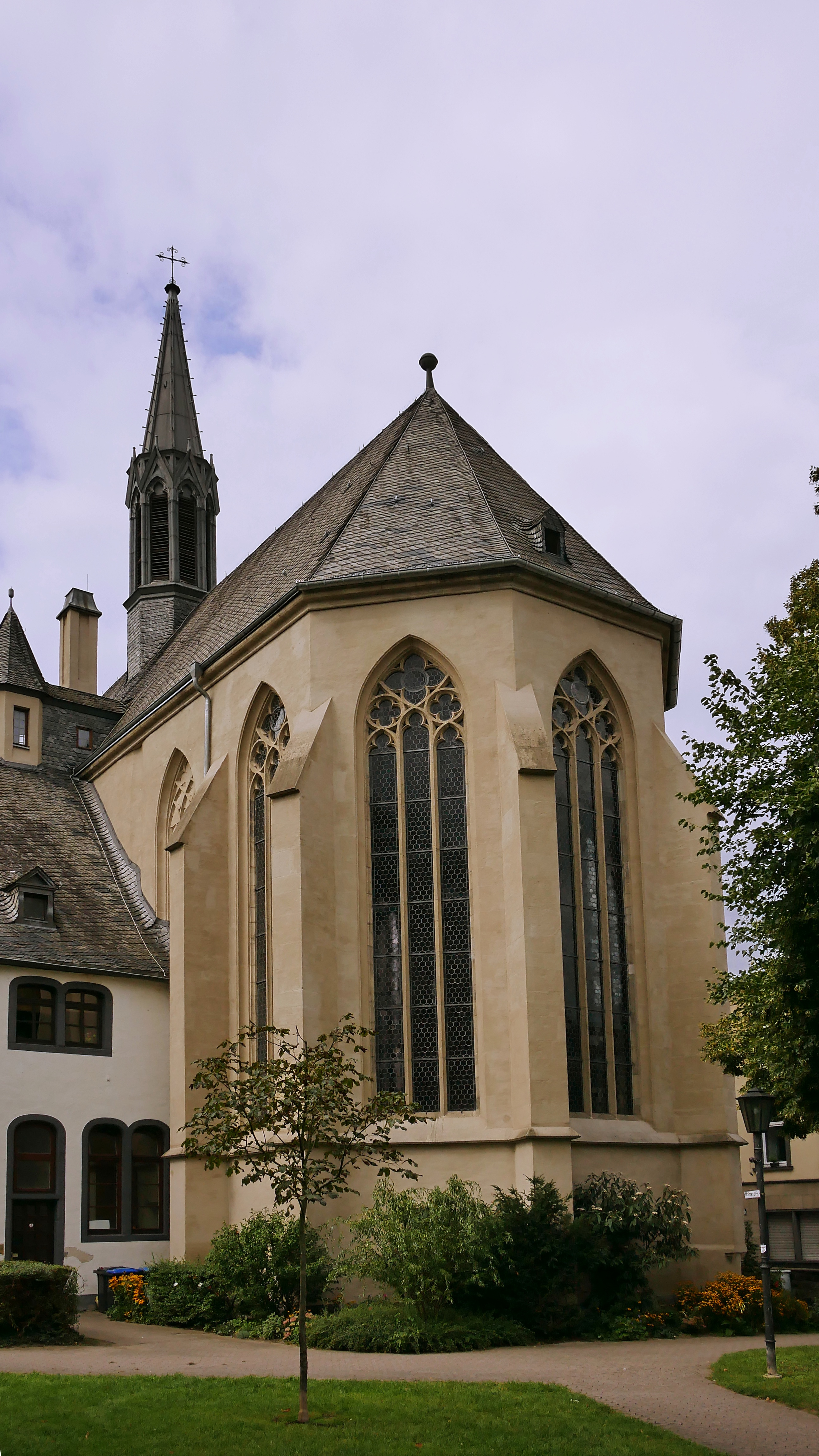 Evangelische Christuskirche Andernach